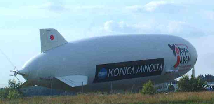 Zeppelin NT für Japan / Der Zeppelin kurz nach seinem Start in Friedrichshafen auf Zwischenstopp in Freiburg im Breisgau